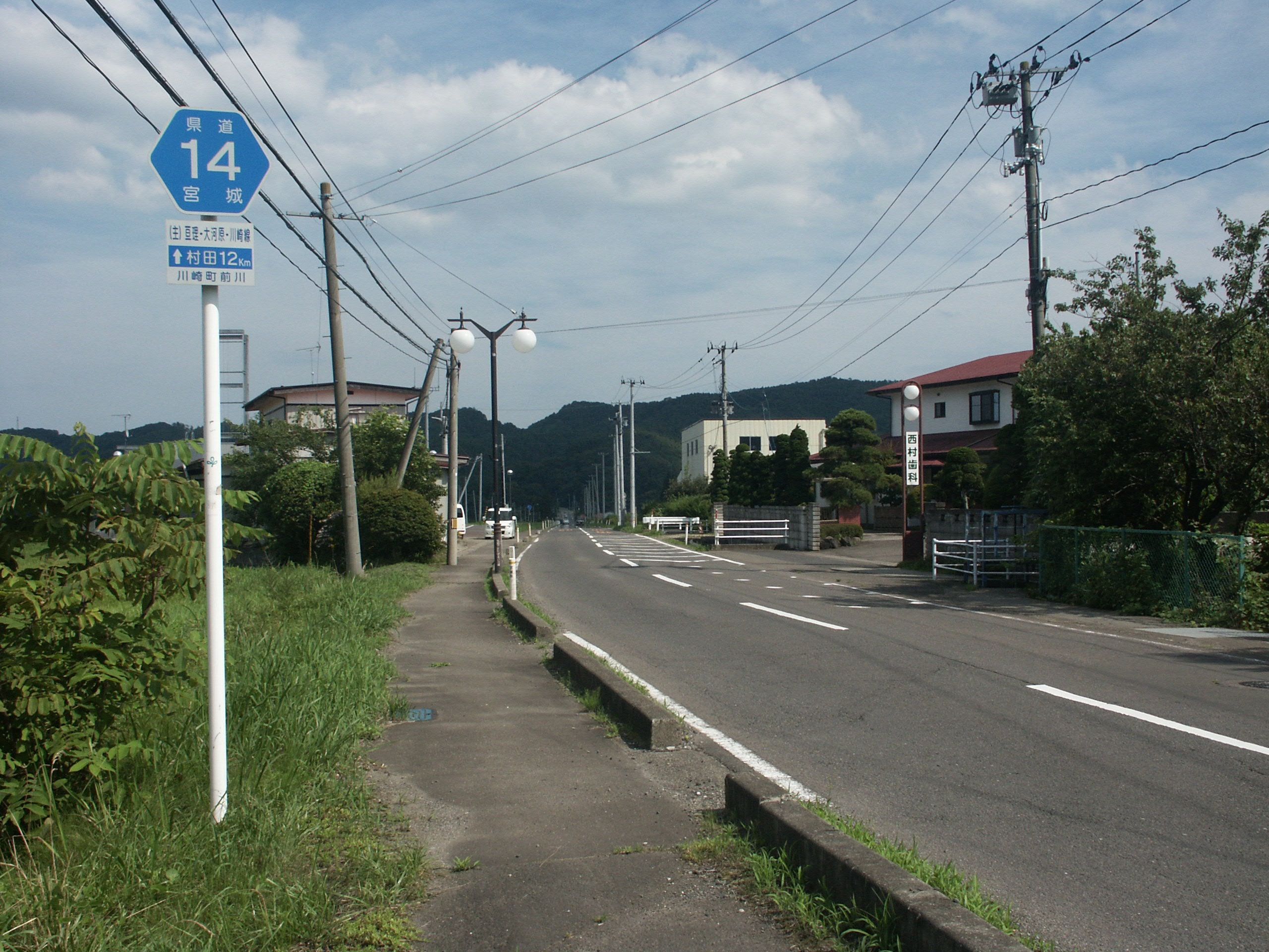 宮城県道14号線川崎町前川付近